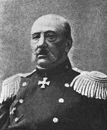 Комаров, Константин Виссарионович